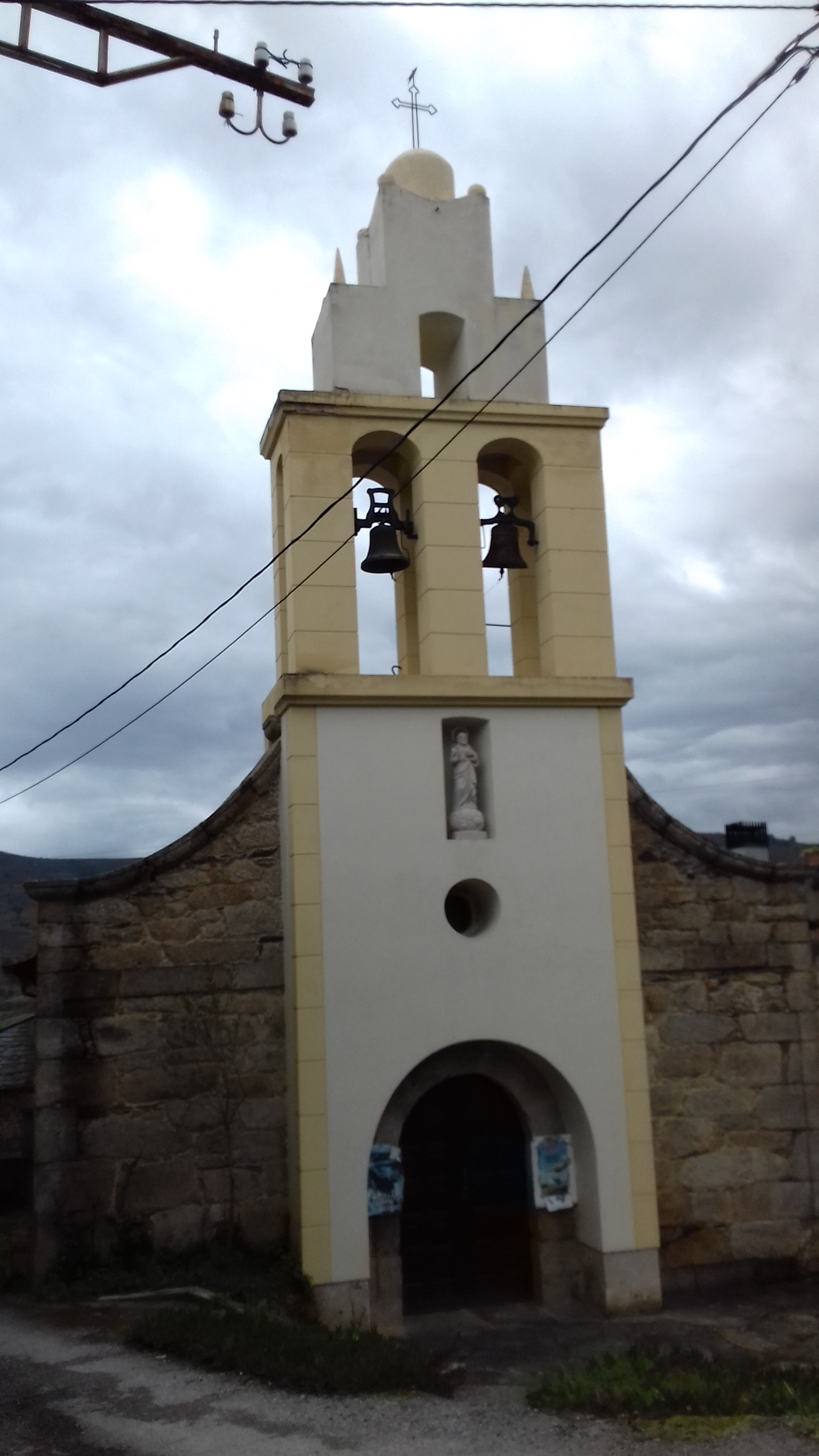 Igrexa de Freixido, Larouco, na aldea da Caseta